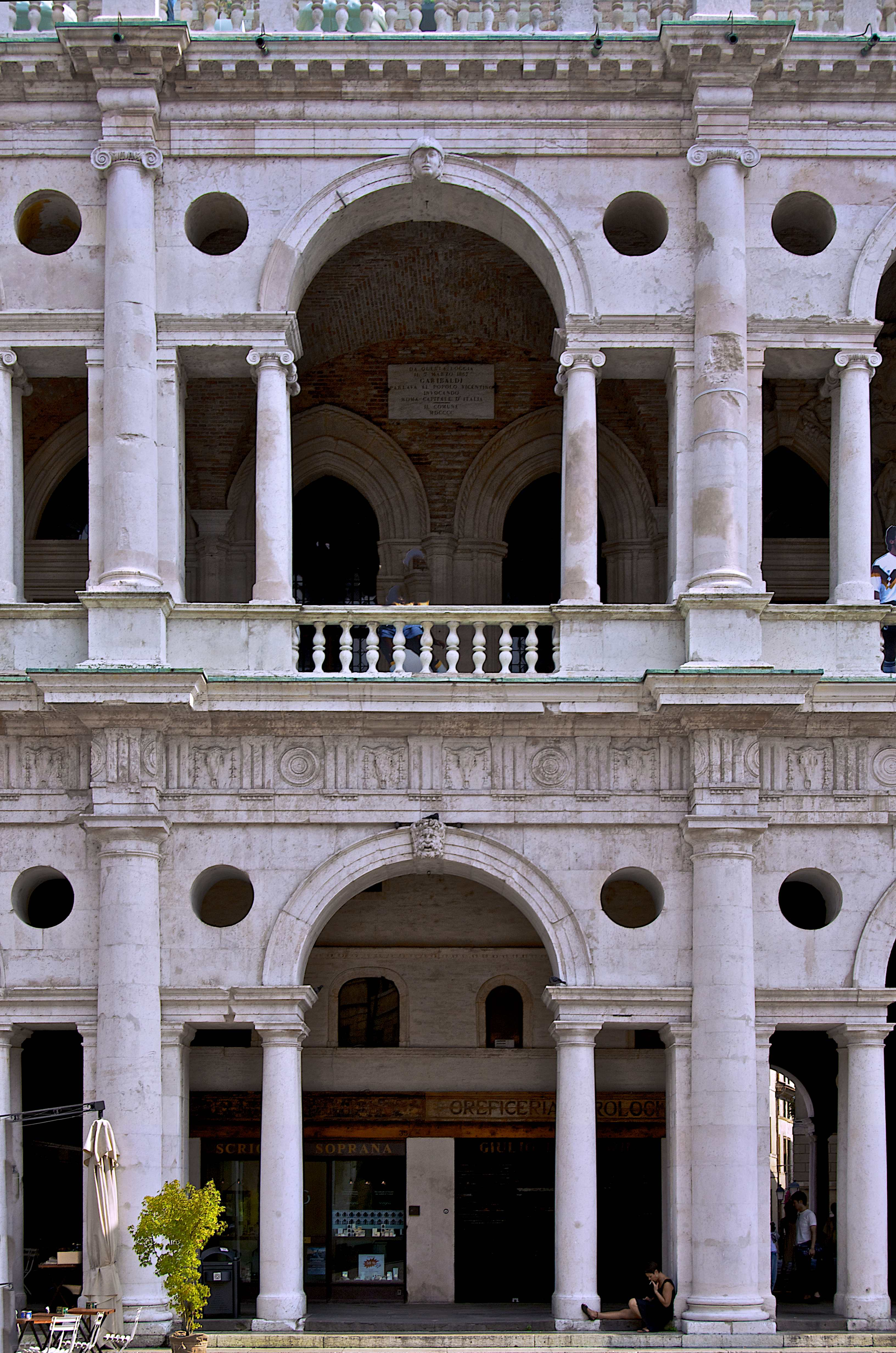 Basilica Palladiana This is a photo of a monument which is part of cultural heritage of Italy.